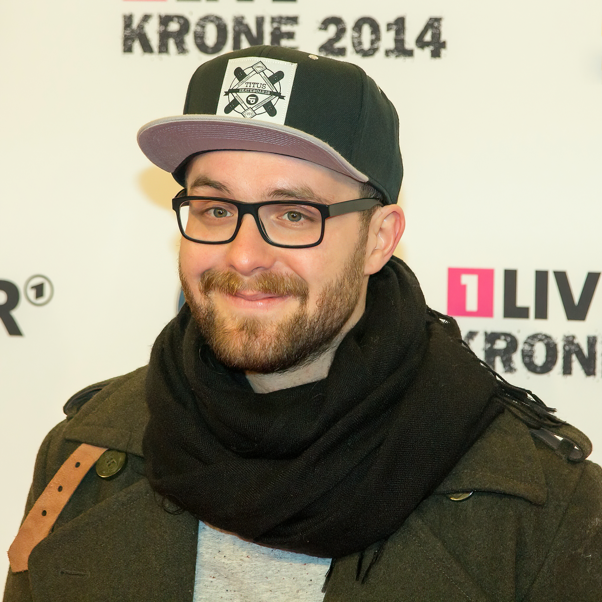 1LIVE Krone 2014 in der Bochumer Jahrhunderthalle: Mark Forster auf dem roten Teppich